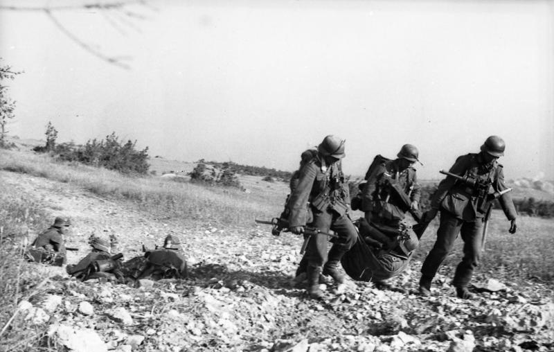 Scherl Bilderdienst An der Sowjetfront: Kameraden bringen einen Verwundeten zurück. PK: Kurschat, 22.6.42 3701-42